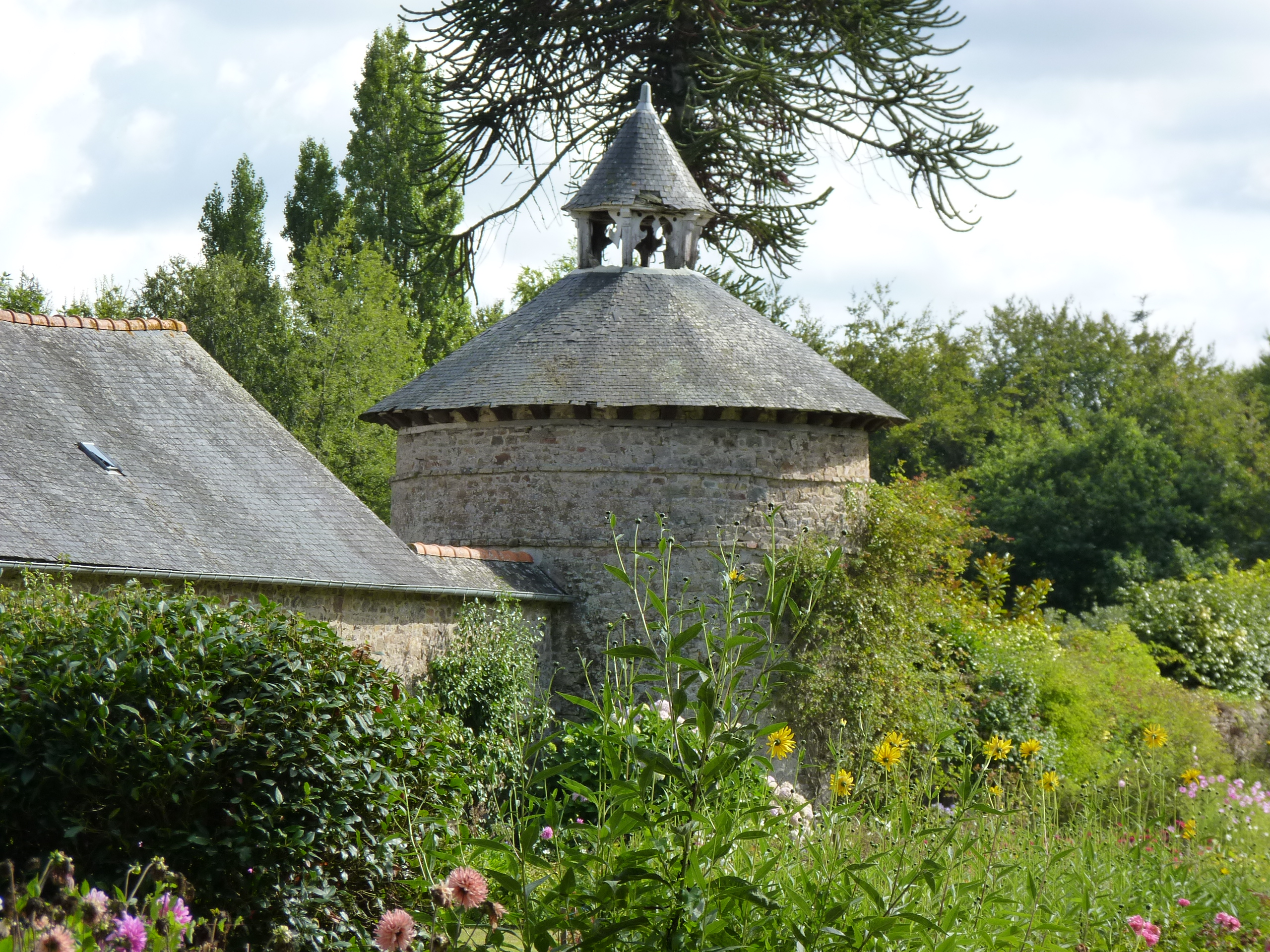 Château du 18ème siècle. Pigeonnier.